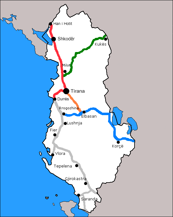 Netzwerk der Albanischen Autobahn